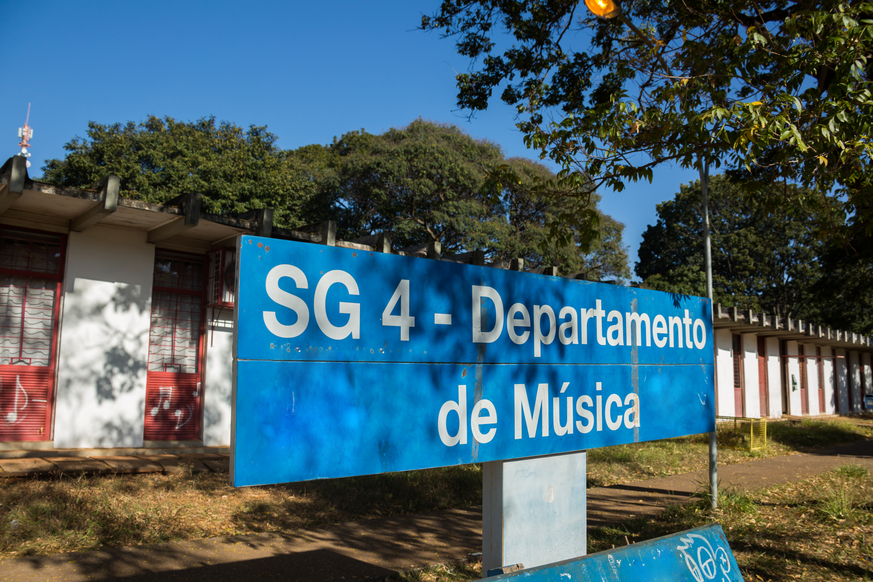 SG4 Departamento de Música da UnB Foto:Raquel Aviani / Secom UnB. ATENÇÃO – As informações, as fotos e os textos podem ser usados e reproduzidos, desde que a fonte seja devidamente citada e que não haja alteração de sentido em seus conteúdos. Crédito para fotos: nome do fotógrafo/Secom UnB